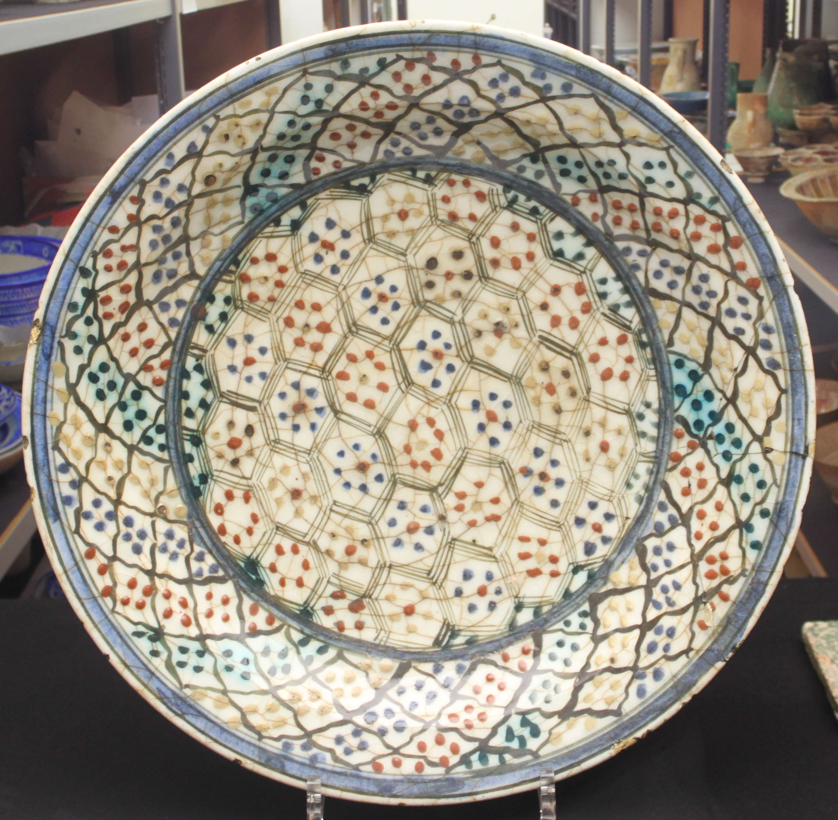 Ariana museum - Plat Iran (Tabriz ou Ispahan) - XVII ième siècle - Inventaire AR 2005-22 Pâte siliceuse, polychromie sous glaçure. Type Kubachi